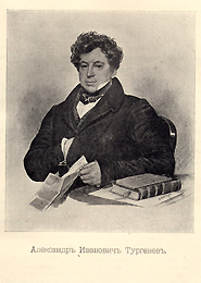 Der russische Diplomat Alexander Turgenew (1785-1845)